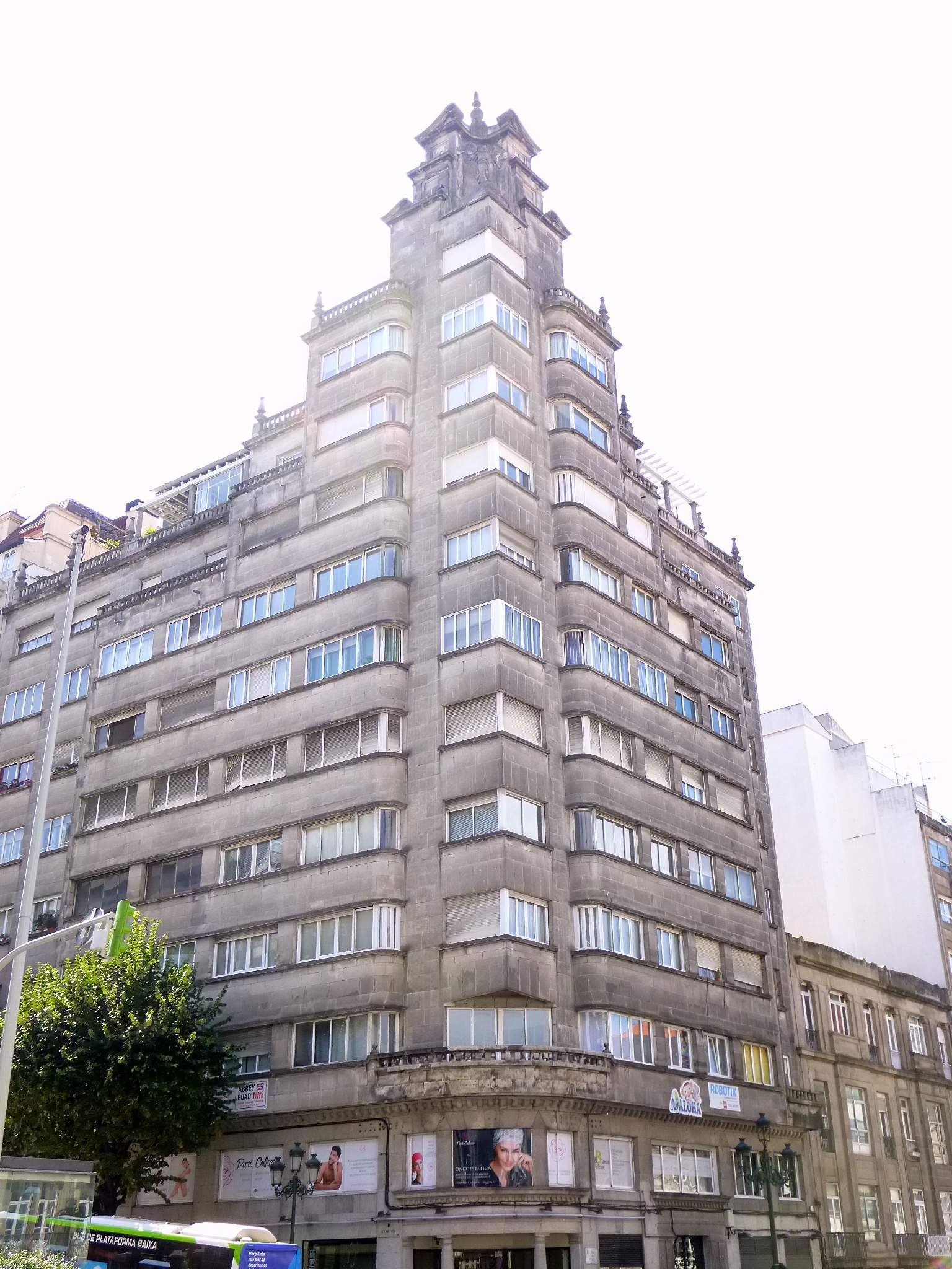 Vigo - Edificio Albo